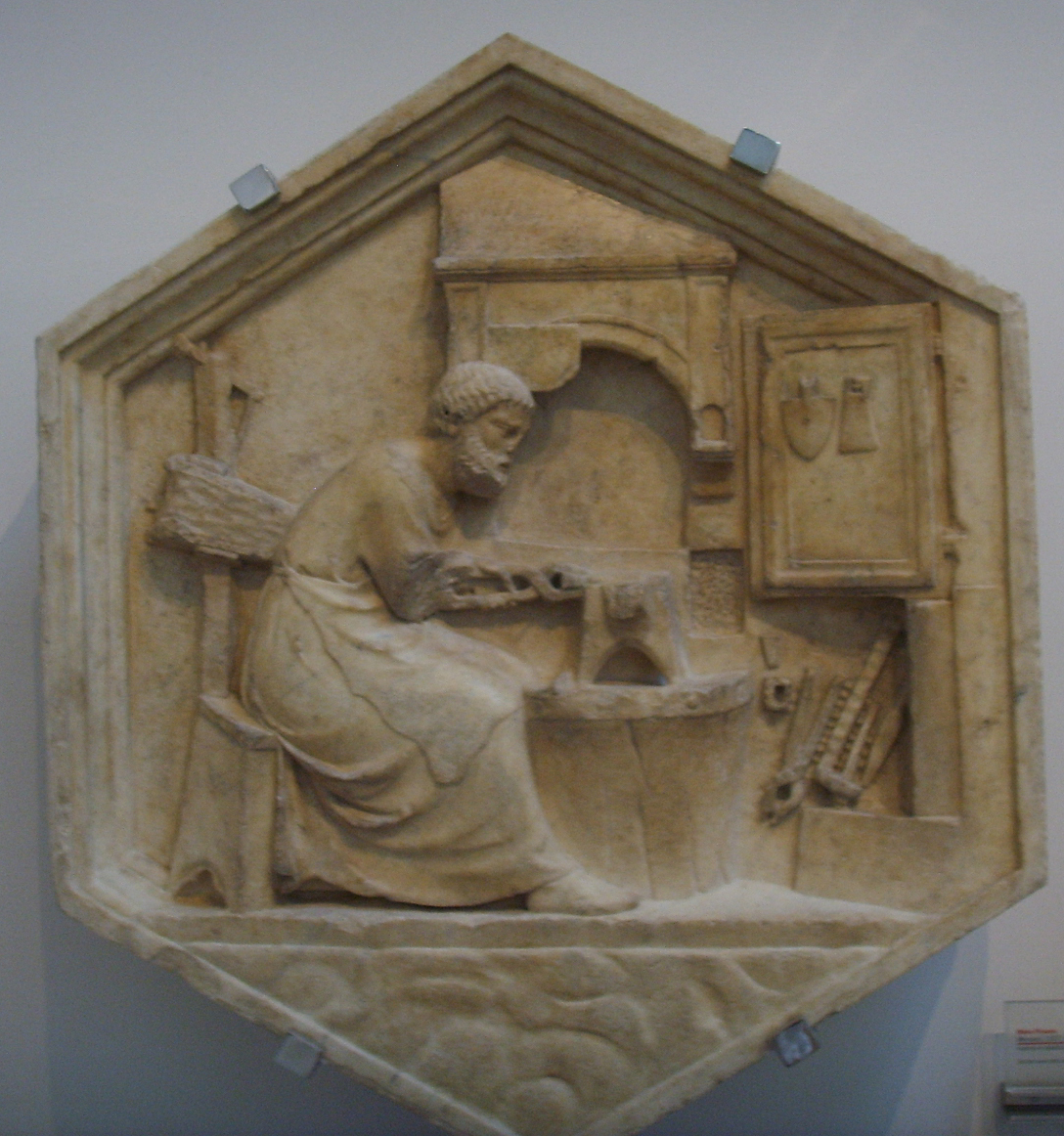 Formella 06, tubailkan, andrea pisano, 1334-1336